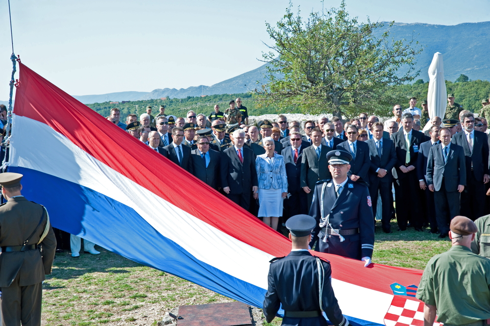 16. obljetnica vojnoredarstvene operacije Oluja u Kninu